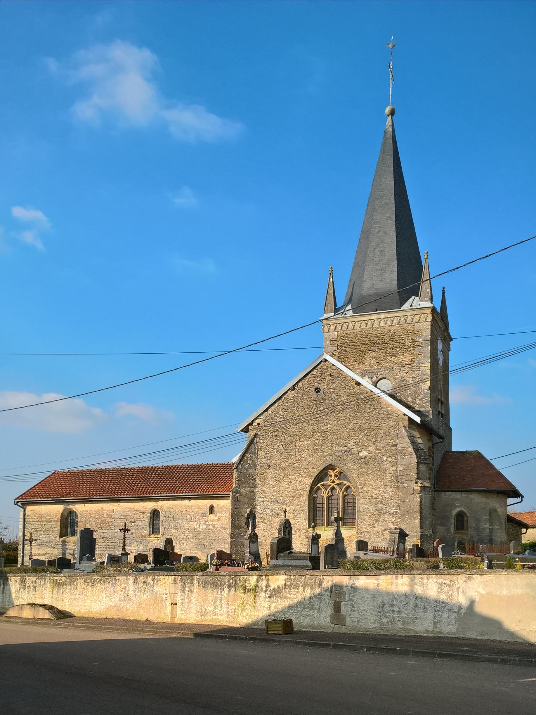 Blumeray, l'église.